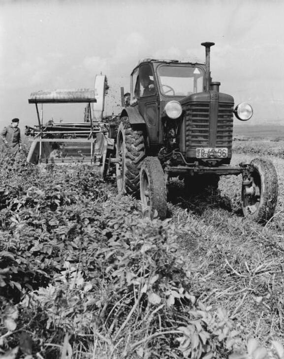 Hainichen, Kartoffelkrauternte Zentralbild Gahlbeck At-20.5.1962 Mähhäcksler zur Kartoffelkrauternte ausgerüstet. Ein Heuererkollektiv der MTS Hainichen im Bezirk Karl-Marx-Stadt hat unter Leitung Dipl.-Ing. Horst Feldmann einen Mähhäcksler für die Kartoffelkrauternte umgebaut. Am Schneidwerk wurden zwei torpedoförmige Krautheber angebracht. Die Haspel ist bis aufs Äußerste angezogen und wischt über die Krautheber. Außerdem wurden die Achsen so verlängert, daß die Spuren genau zwischen den Kartoffelseilen ausgefahren werden, damit die im Boden liegenden Knollen nicht beschädigt werden. UBz: Der durch das Neuererkollektiv der MTS Hainichen für die Kartoffelkrauternte ausgerüstete Maschinensatz auf dem Feld. Auch die Zugmaschine und der Hänger wurden so ausgewählt, daß die Kartoffeln nicht beschädigt werden. Dabei hat sich ein 3 Tonnen fassender Wechselanhänger mit 1,30 Meter Spurweite bewährt.